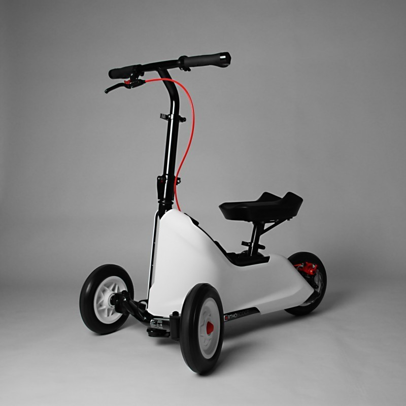 Der Fußentlastungsrollator ist geeignet sowohl für die prä- sowie postoperative Patientenversorgung als auch für Langzeitanwender. Er soll dabei helfen, den Alltag bei Verletzungen erheblich zu erleichtern.